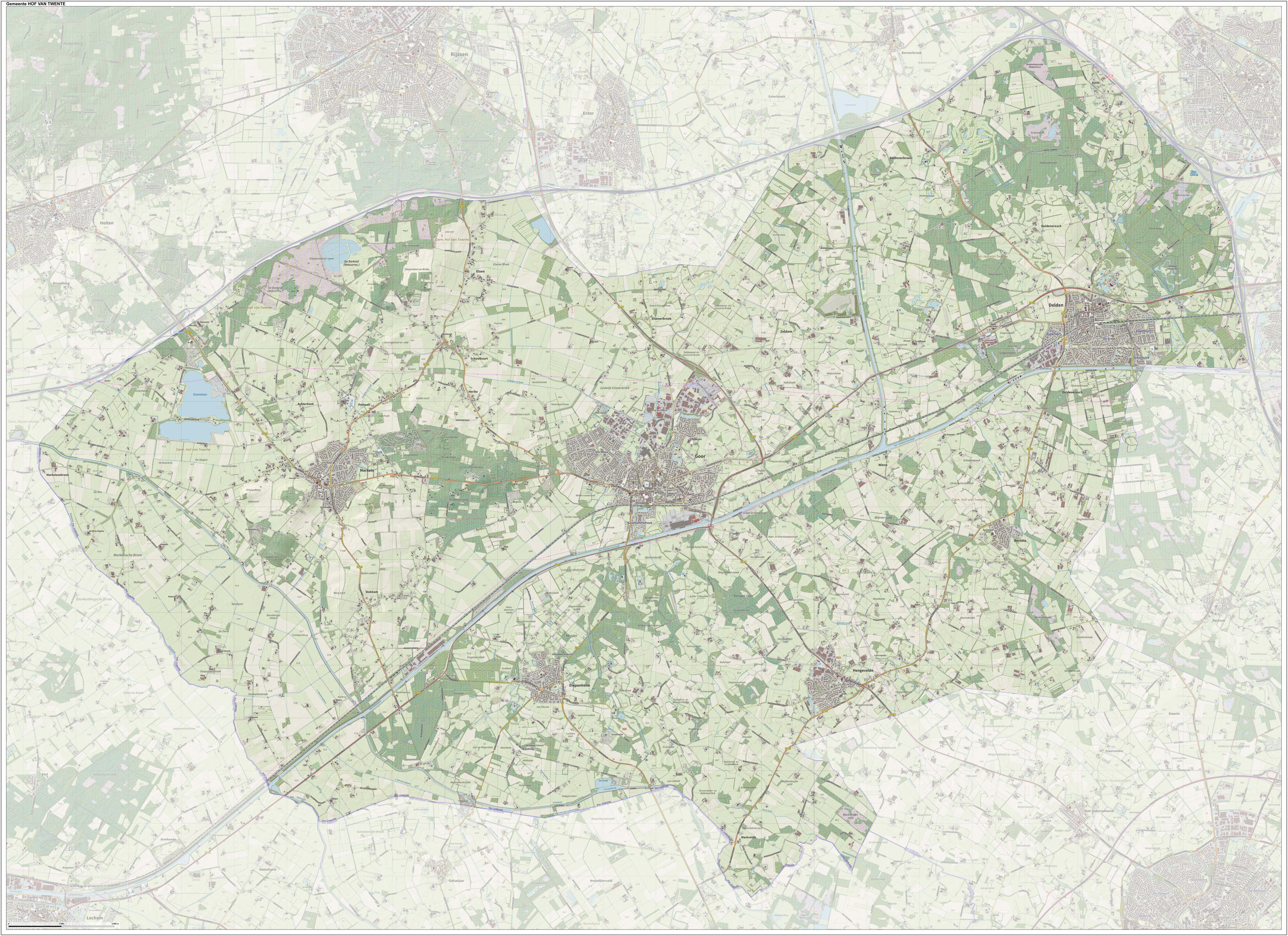 Topografische gemeentekaart. Resolutie: 400 pixels/km. Kaartbeeld samengesteld uit de open geodata van de Top10NL en Top25namen (Kadaster), Creative Commons-BY licentie. Gebouwvlakken uit open geodata BAG extract. Wegen uit de OpenStreetMap, OpenStreetMap community. Reliëfschaduw uit de Actuele Hoogtekaart AHN2. Samenstelling en kleurenschema: Jan-Willem van Aalst, met QGIS. Zie ook de Legenda.